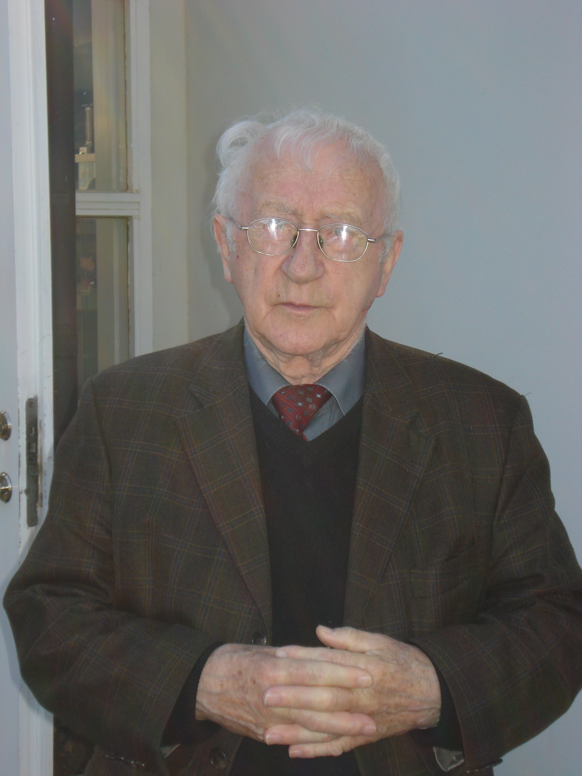 þórður Tómasson, Founder og Skógarsafn, Iceland